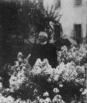 Alfons Bébar (1881 - 1940), Český římskokatolický duchovní.